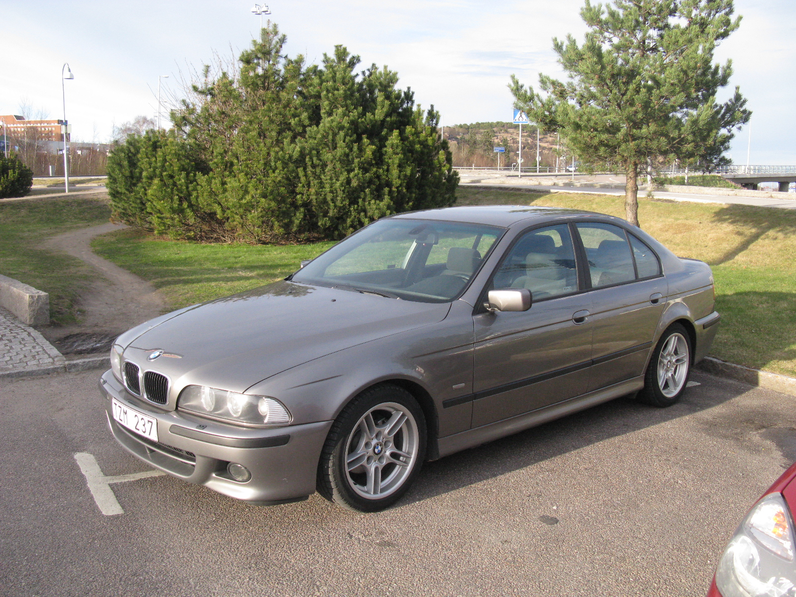 BMW 525i M Sport E39